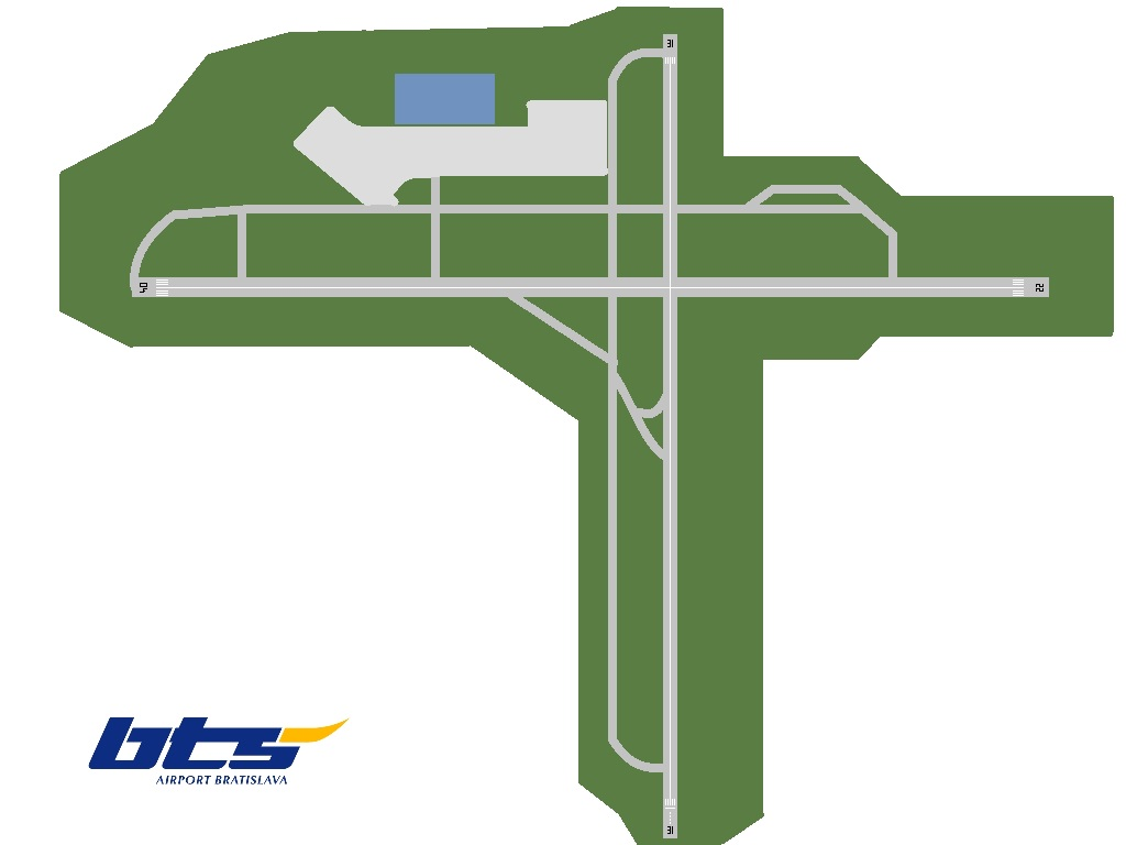 Schéma letiska M.R.Štefánika Bratislava